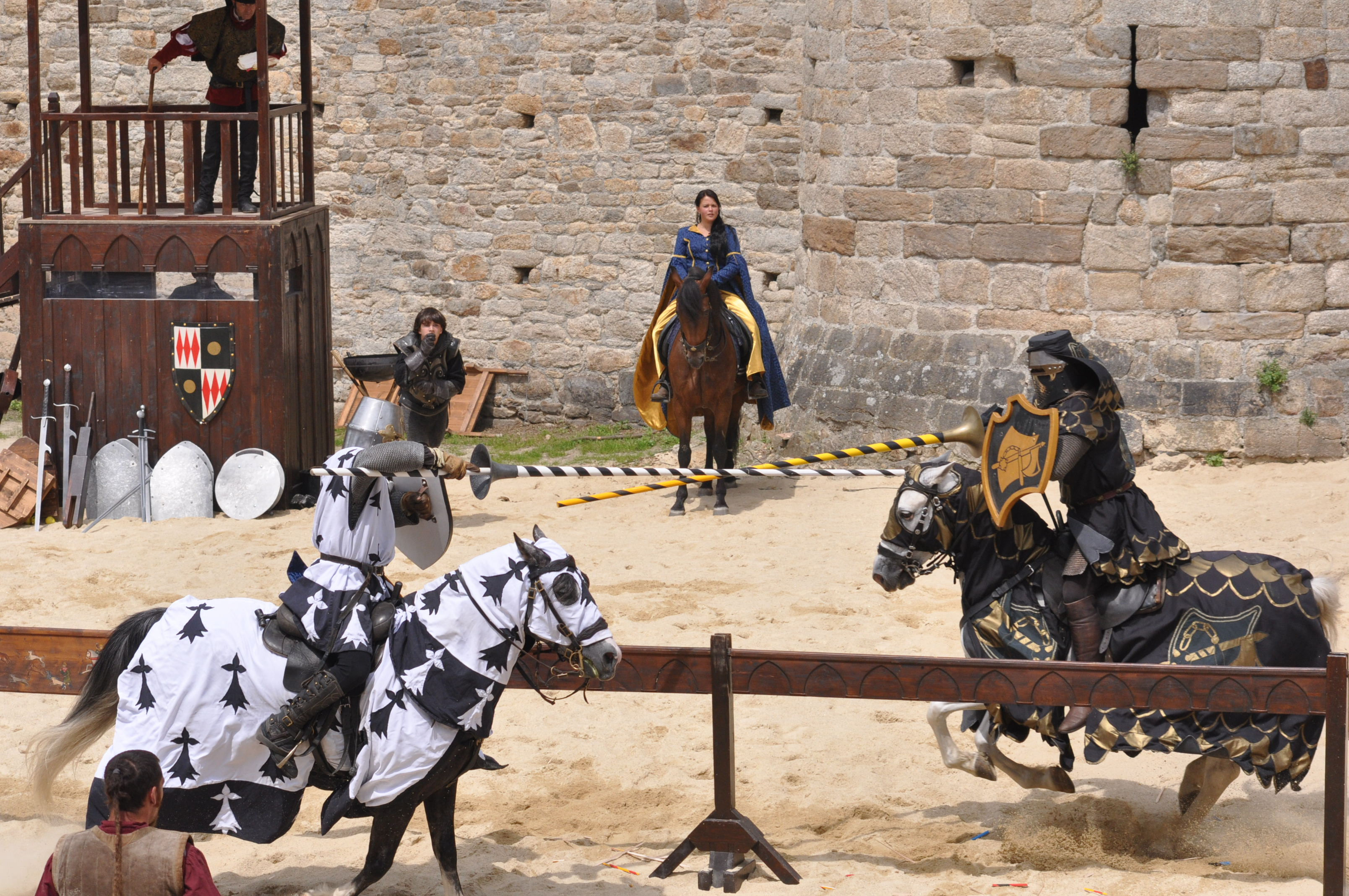 Tournoi au Festival des Remparts à Dinan.